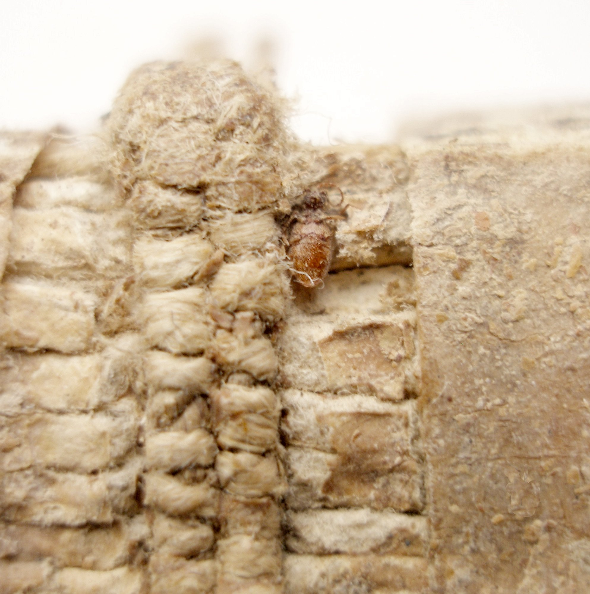 Stegobium paniceum